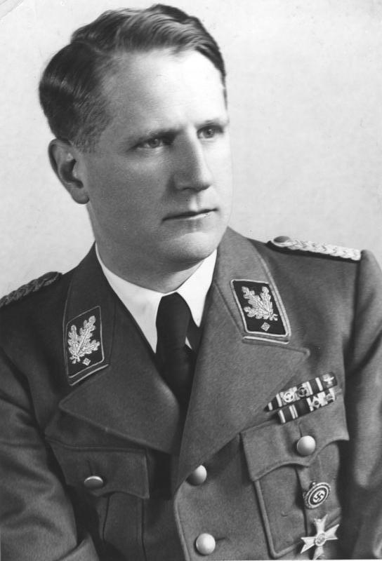 Leonardo Conti Reichsgesundheitsführer Dr. Leonardo Conti (Porträt) Abgebildete Personen: Conti, Leonardo Dr. med.: Reichsgesundheitsführer, SS-Obergruppenführer, Deutschland